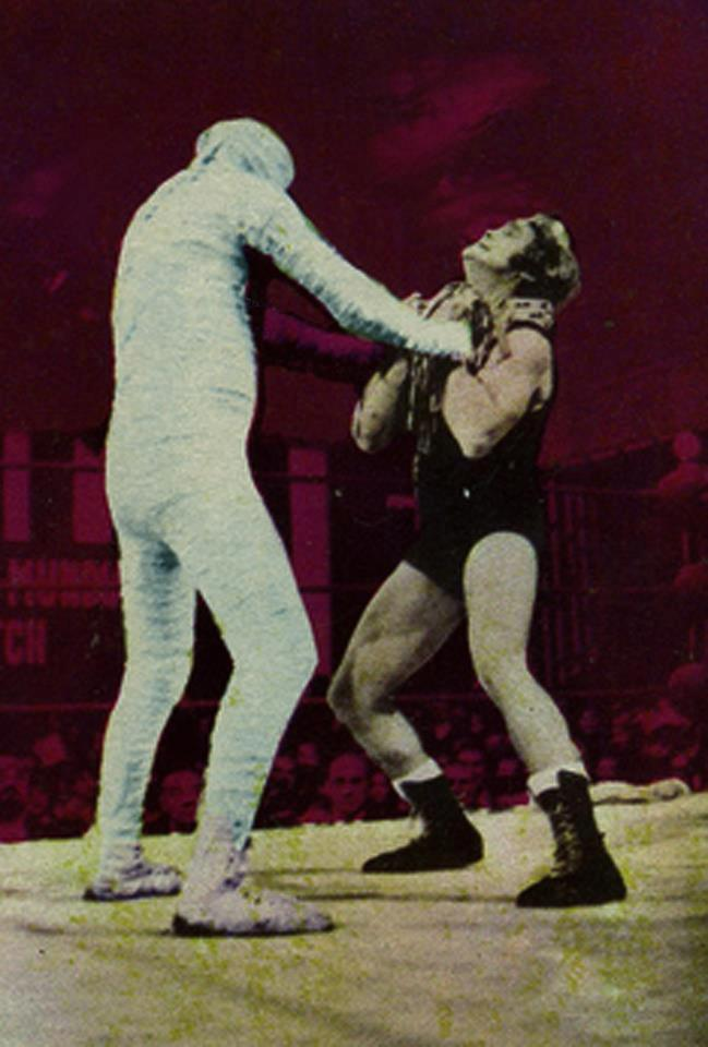 combate entre la momia y el gitano ivanoff